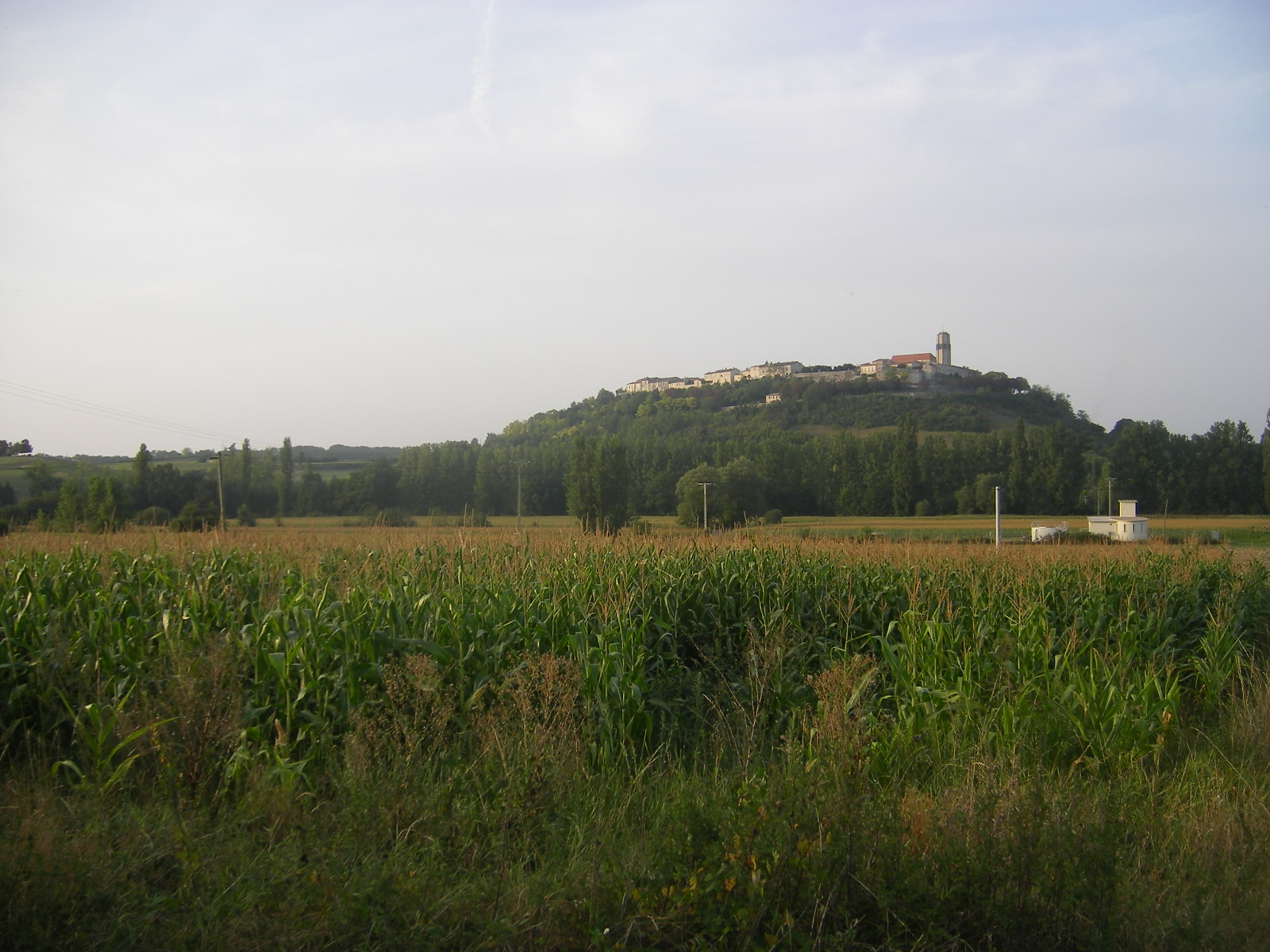 Tournon d´Agenais